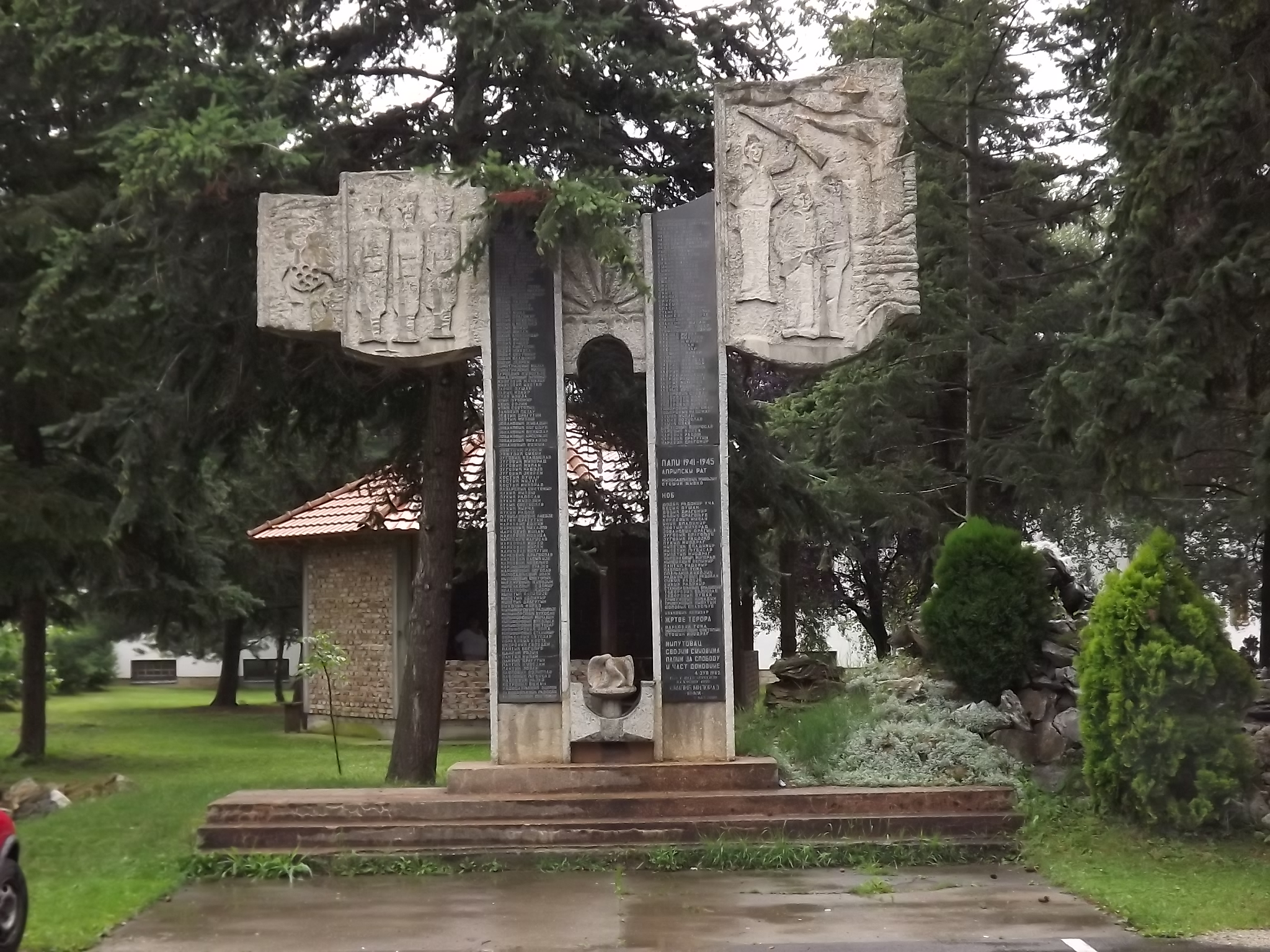 Srpski (latinica): Spomenik borcima u oslobodilackim ratovima selo Milutovac. Fotografija nastala u okviru saradnje Narodnog univerziteteta Trstenik.Narodne biblioteke Jefimija i Saveza boraca Trstenik.